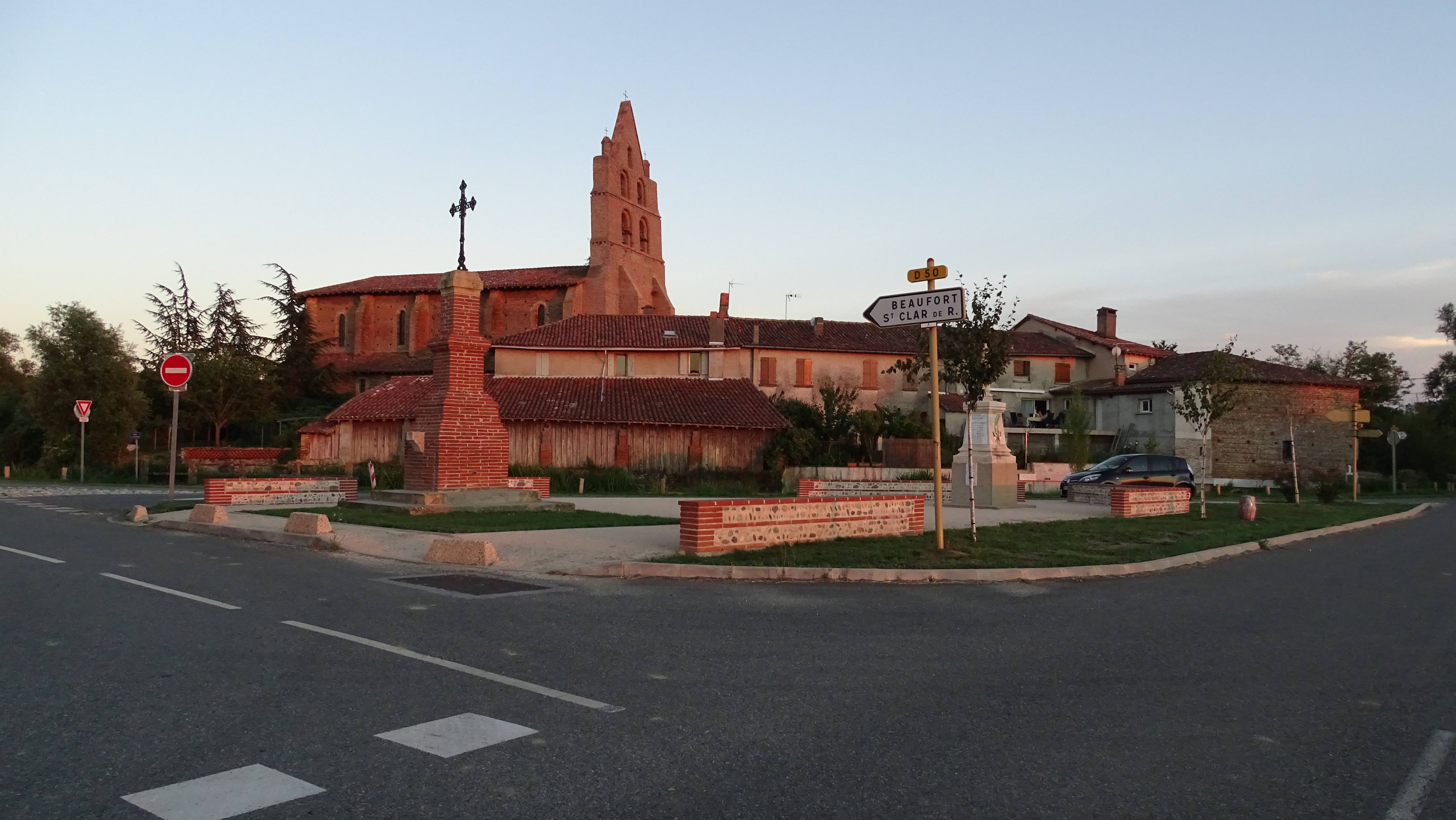 Église de Sabonnères